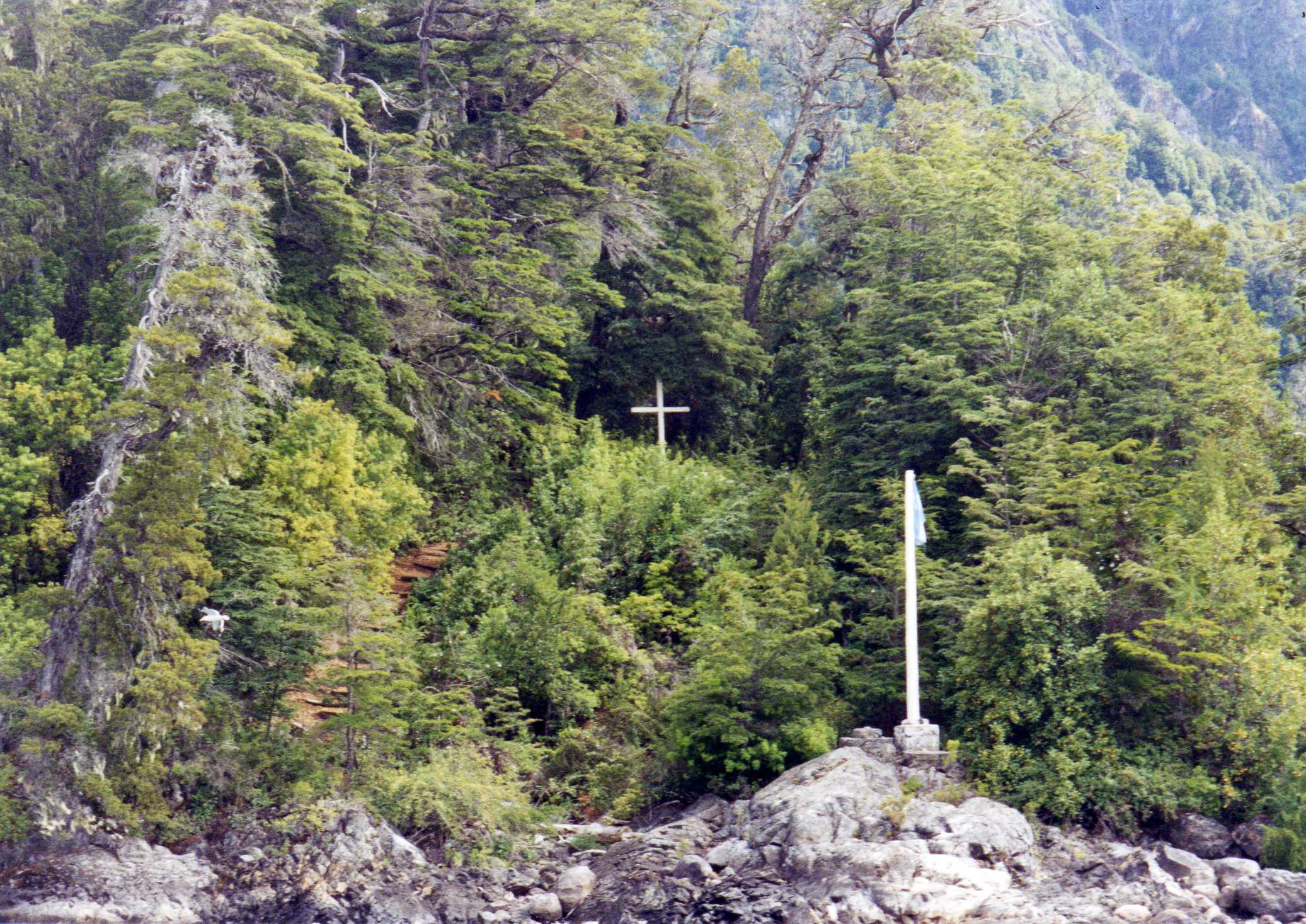 Tumba de Francisco Pascasio Moreno, en Bariloche, Patagonia Argentina.